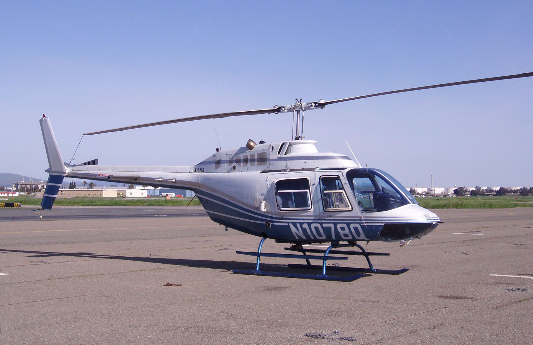 March 2010.